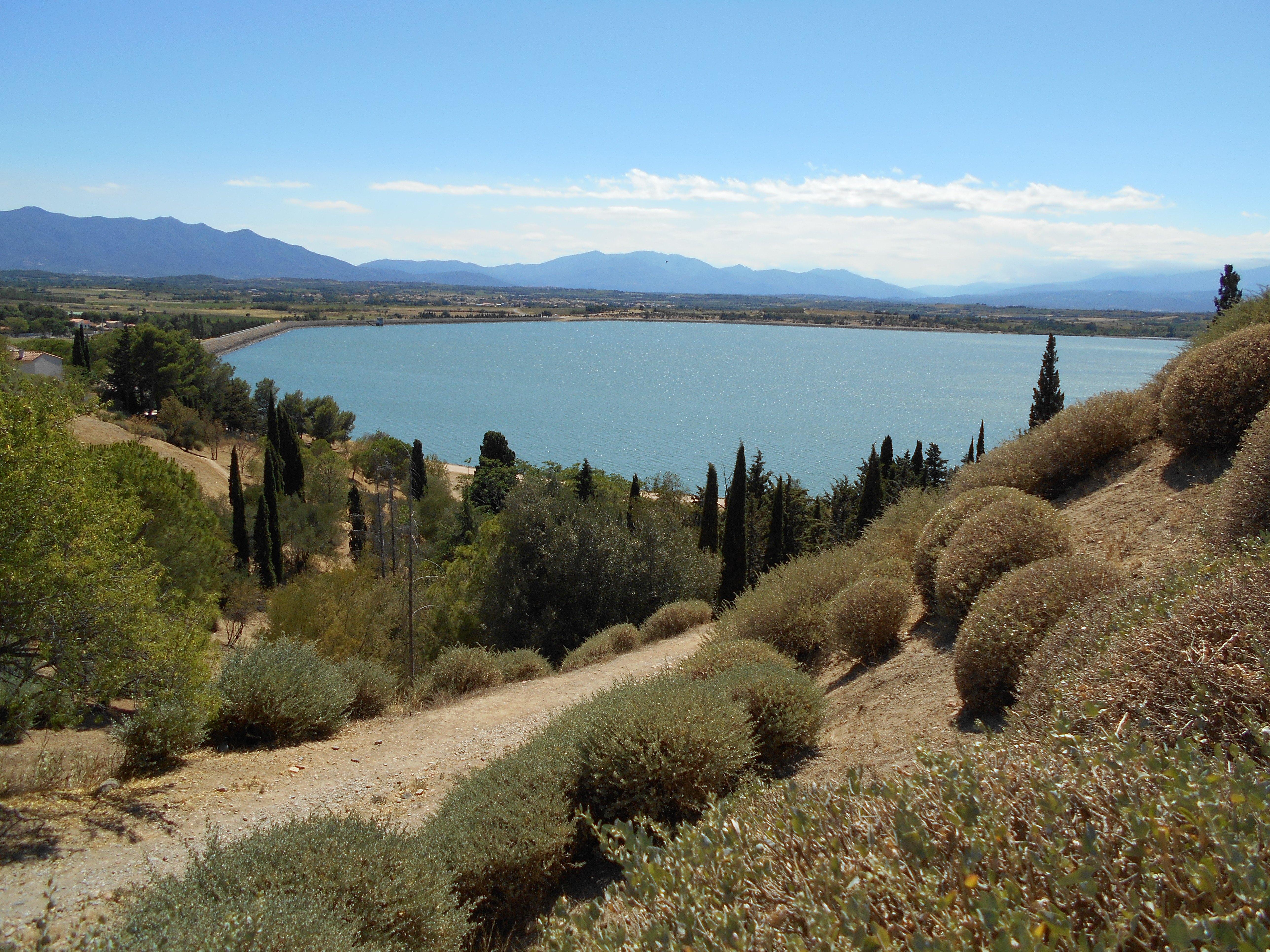 L'Estany de Vilanova, meitat est